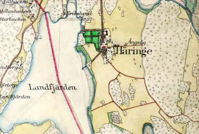 Häringe och omgivning på häradskartan 1901-1906